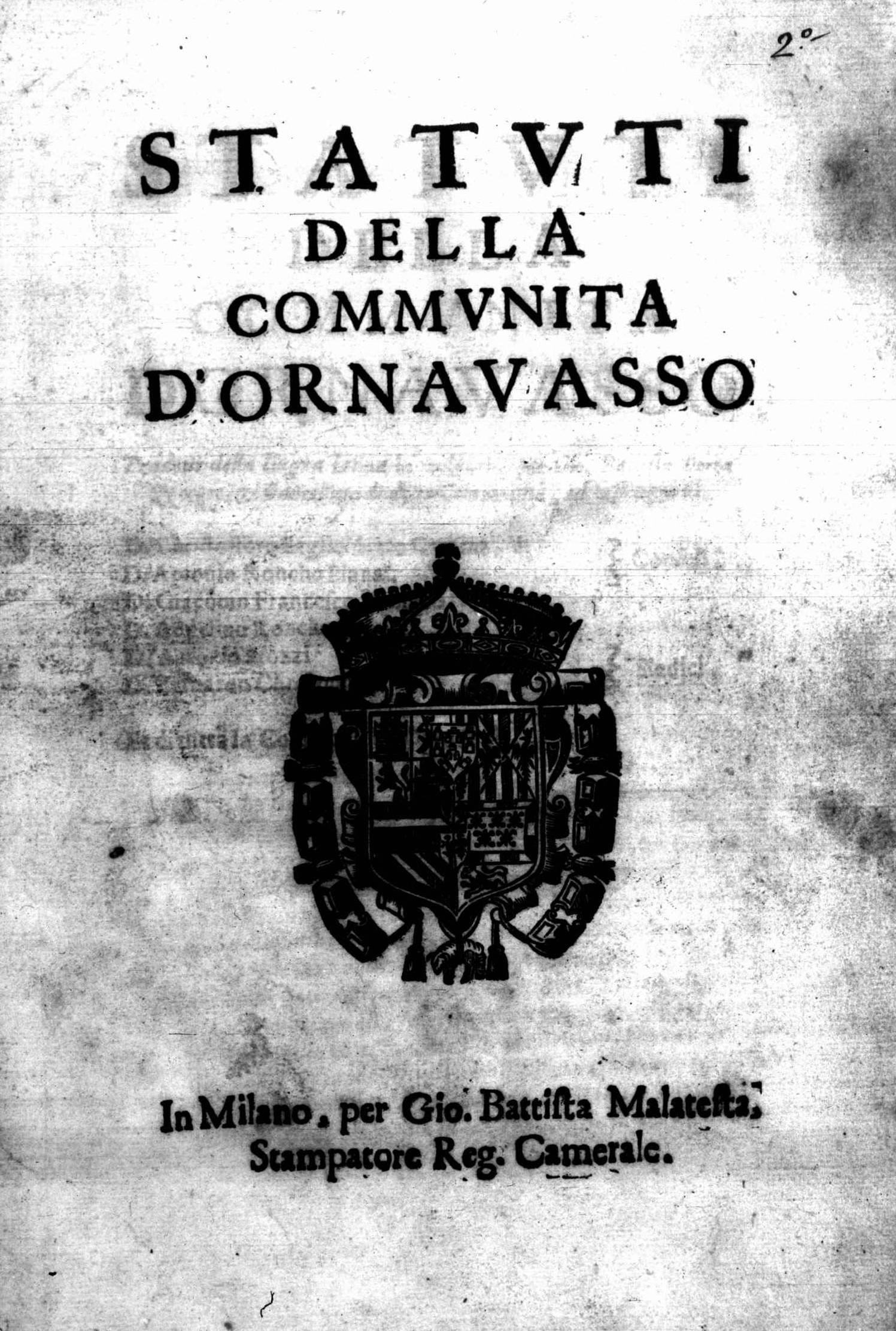 Frontespizio